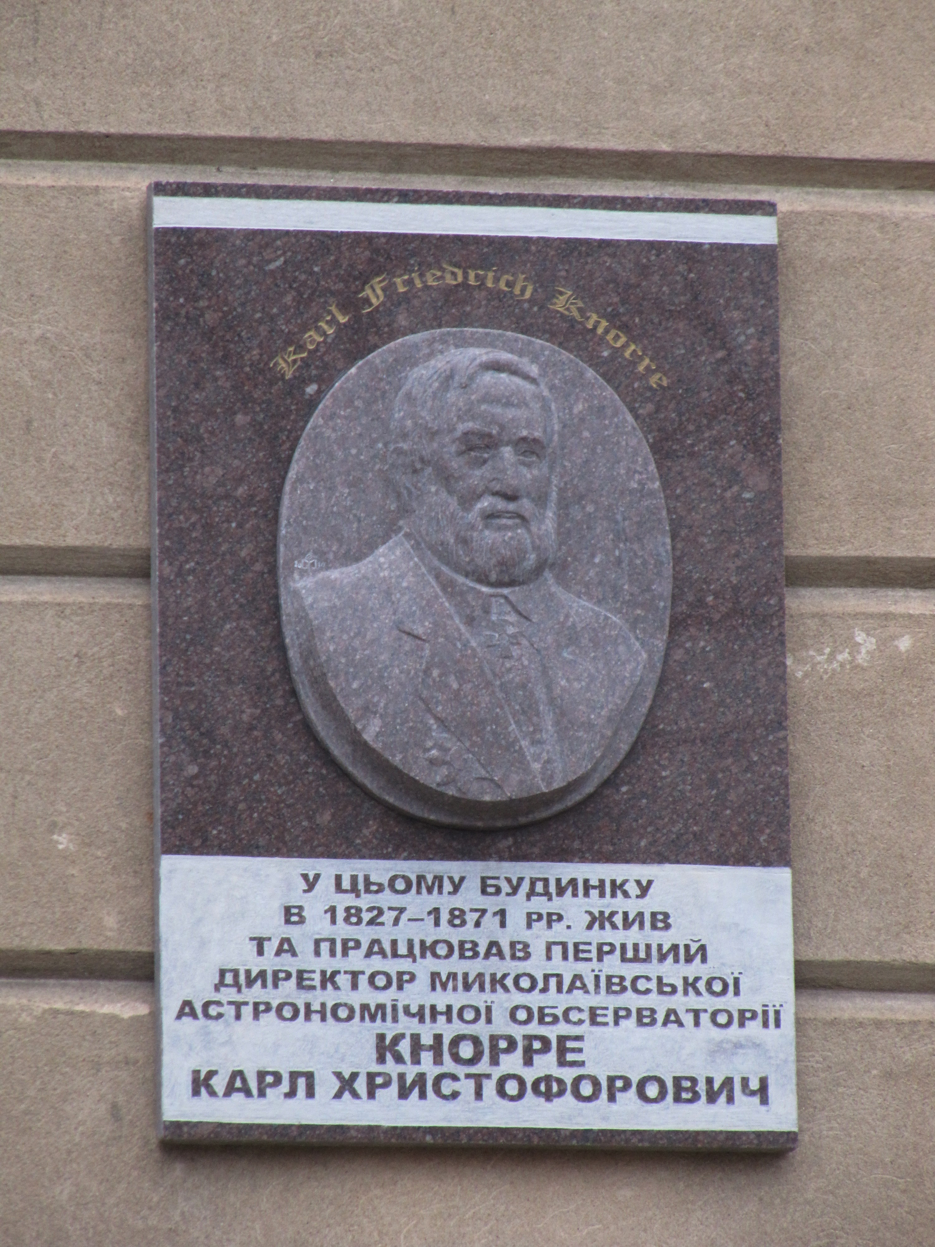 Меморіальна дошка астроному Карлу Кнорре на будинку Миколаївської обсерваторії Миколаївська весна у Вікіпедії